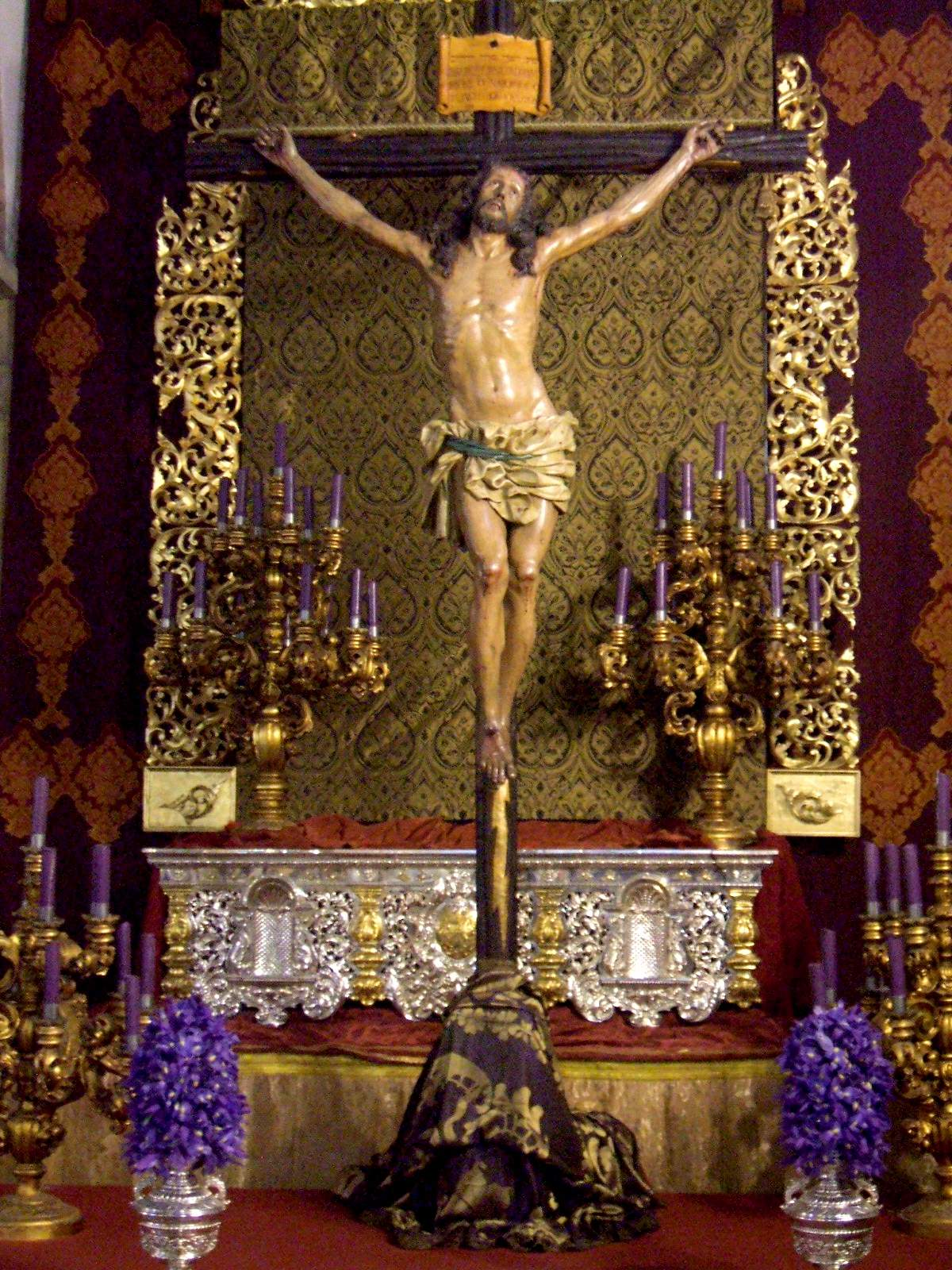 Iglesia San Bartolomé (Jaén)